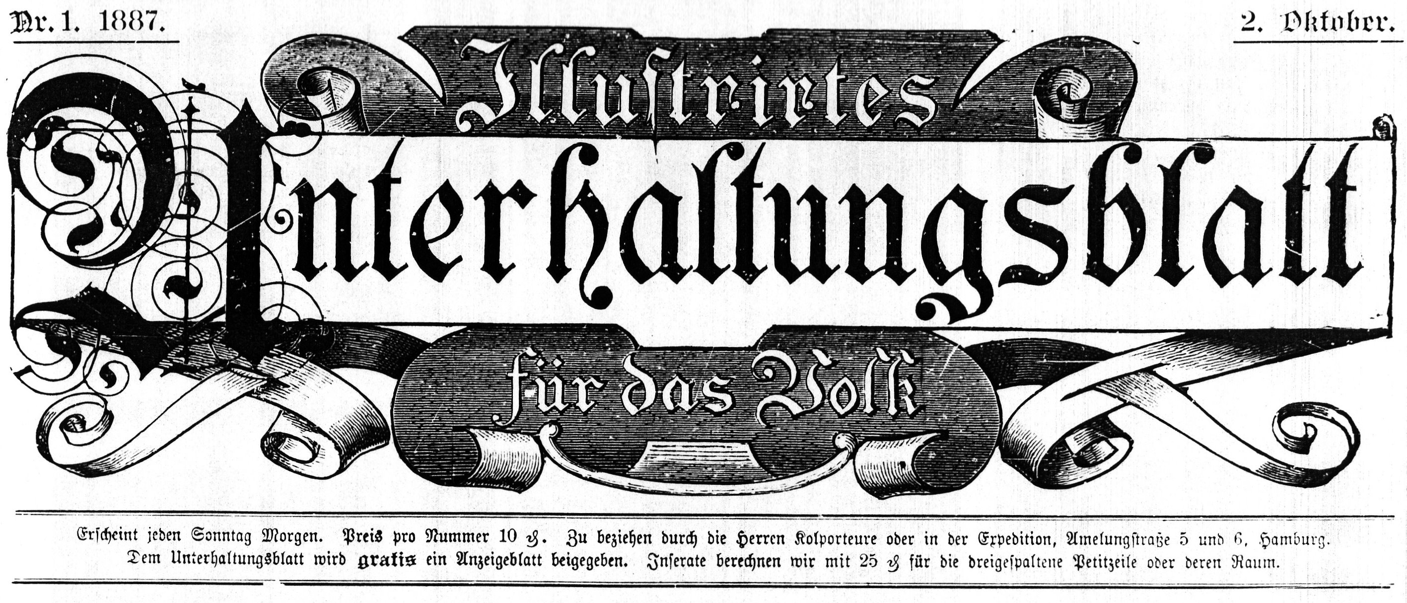 Entwurf des Zeitungskopfes der Zeitschrift "Illustrirtes Unterhaltungsblatt für das Volk"